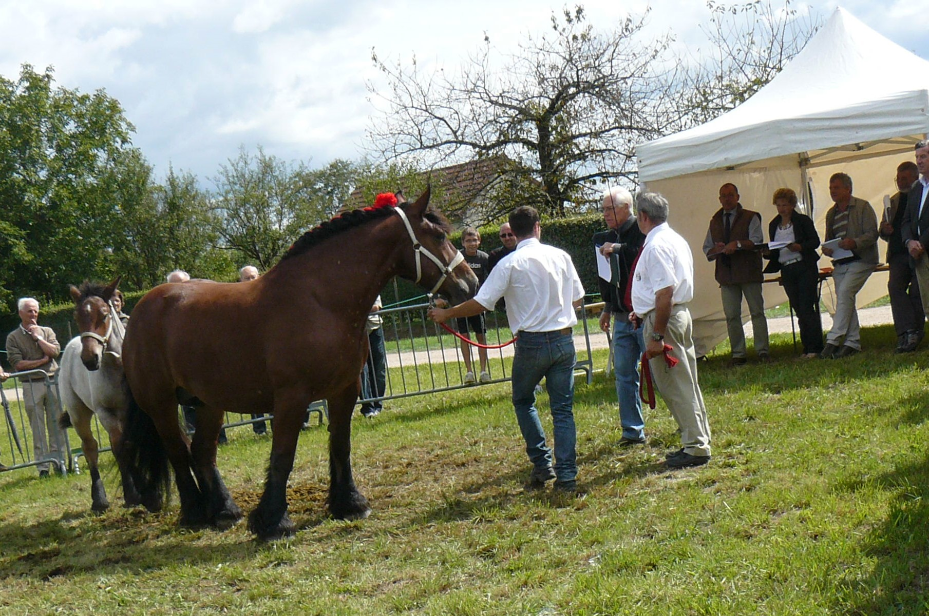 Concours de chevaux de trait à Lalheue (Saône-et-Loire). Le jury.